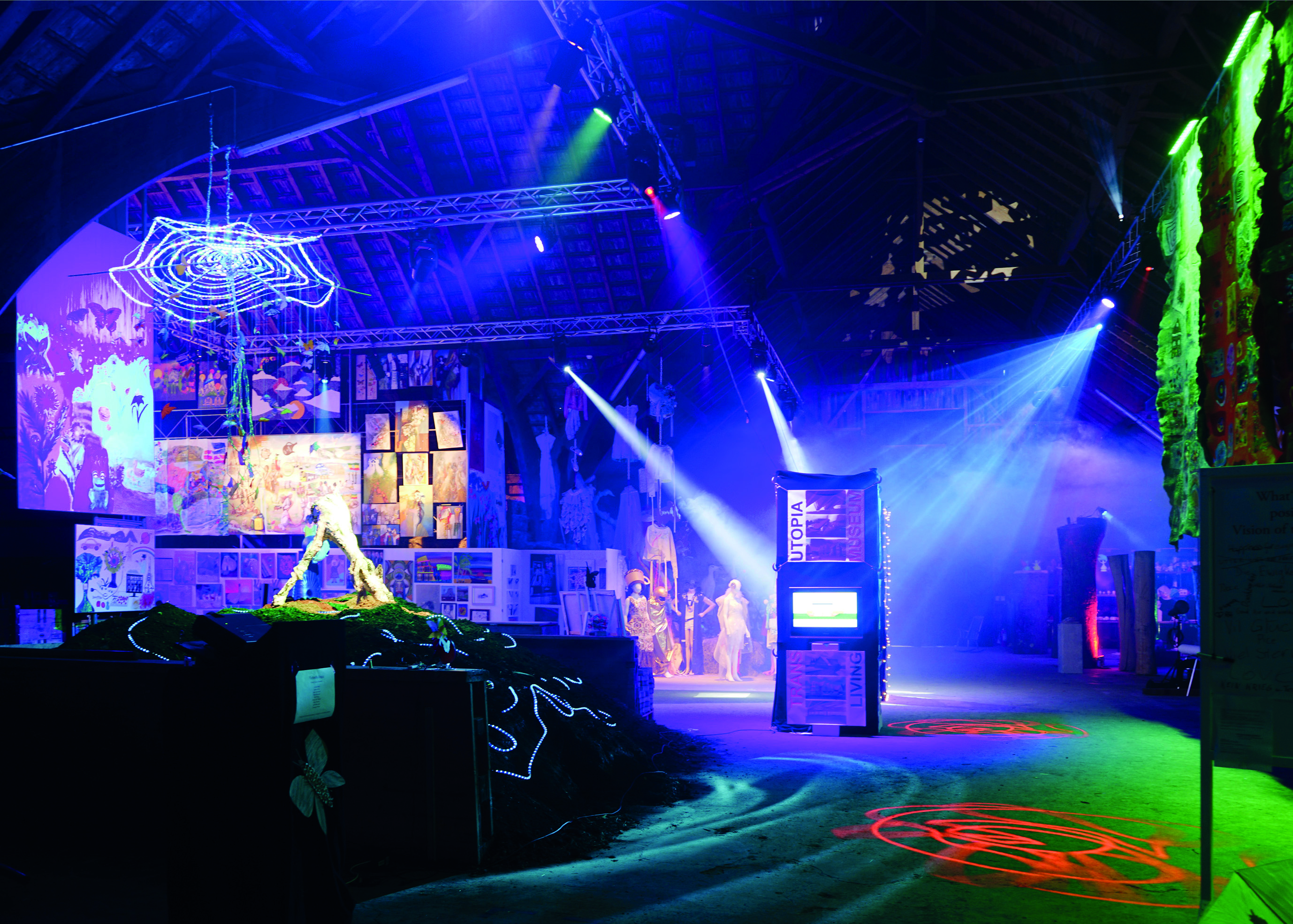 TransUtopia Ausstellung aller Living Museums